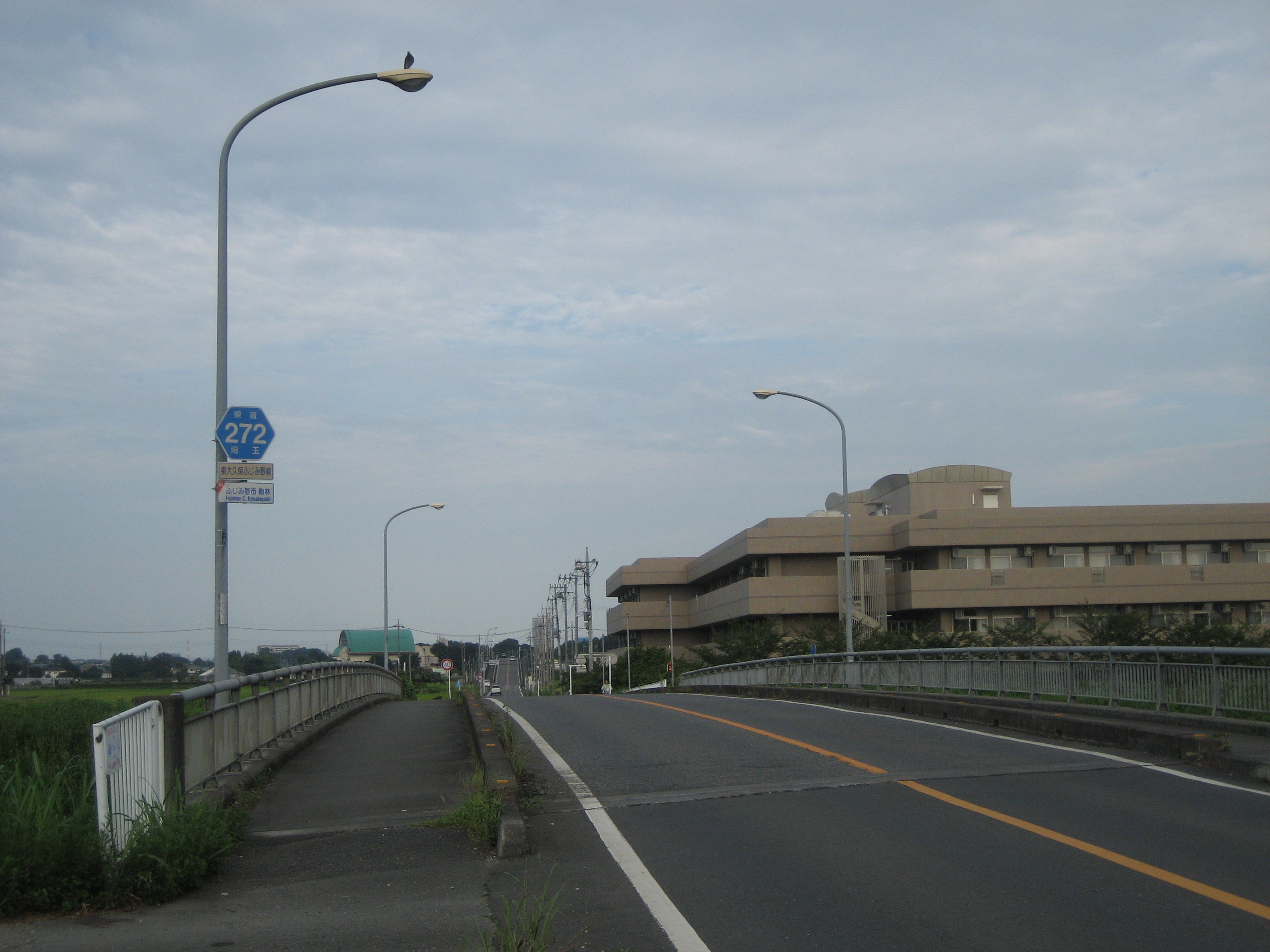 埼玉県道272号線富士見市内